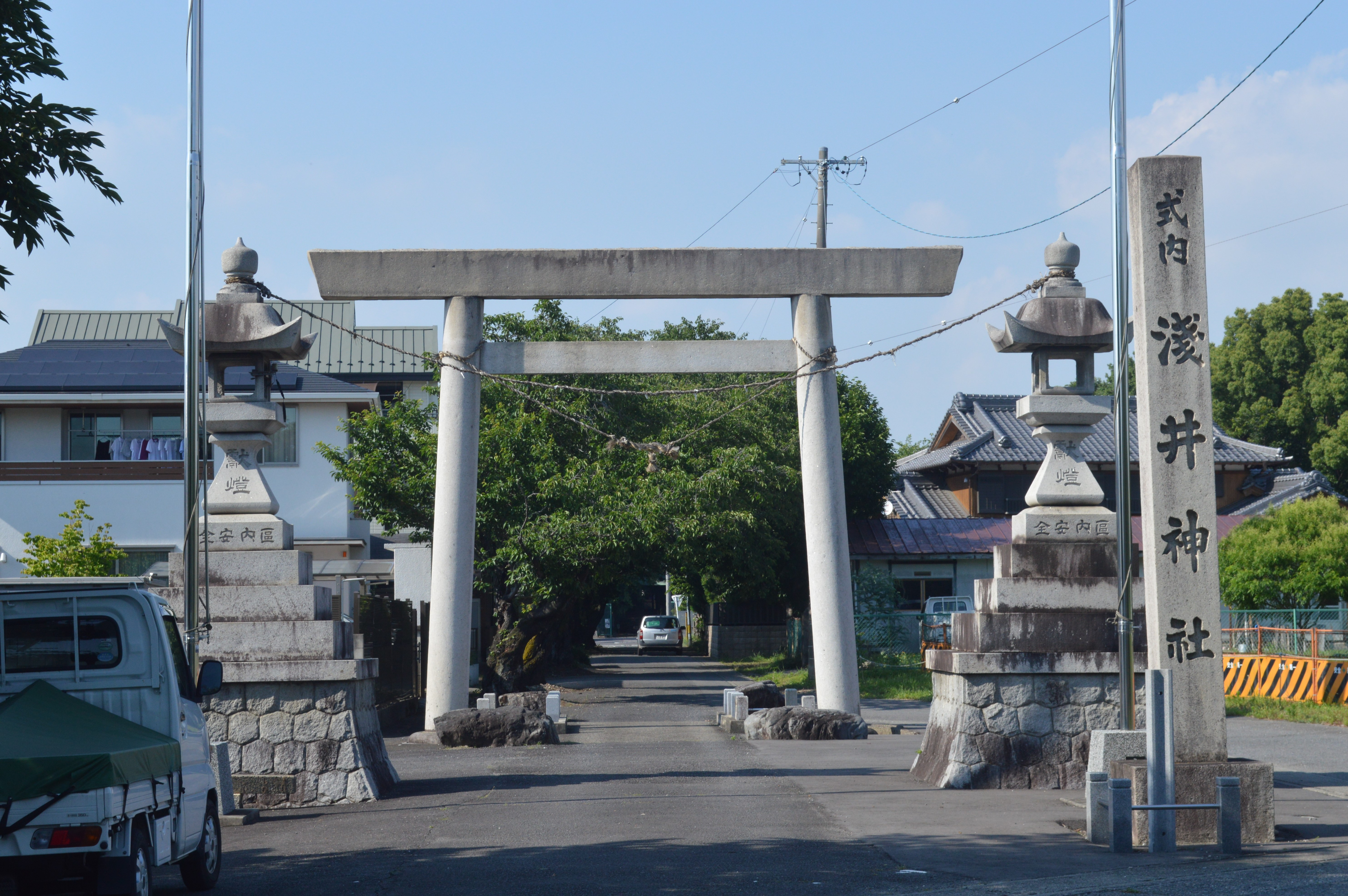 愛知県一宮市にある浅井神社。式内社。